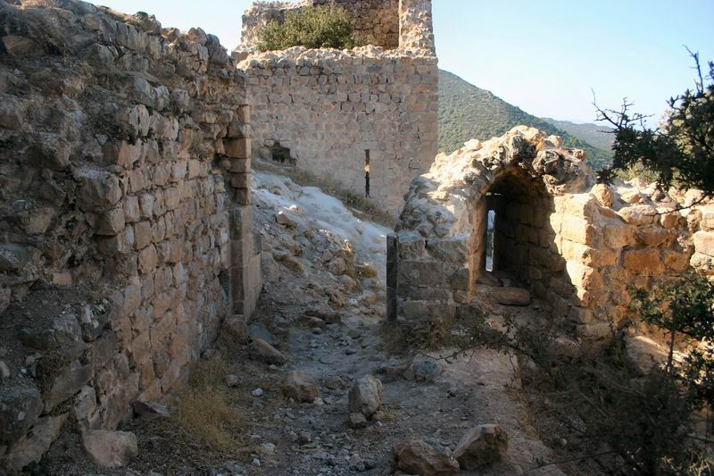 Abu Qubeis eigenes Foto von 2004 public domain Mewes 21:01, 20. Feb 2005 (CET) Äußeres Tor